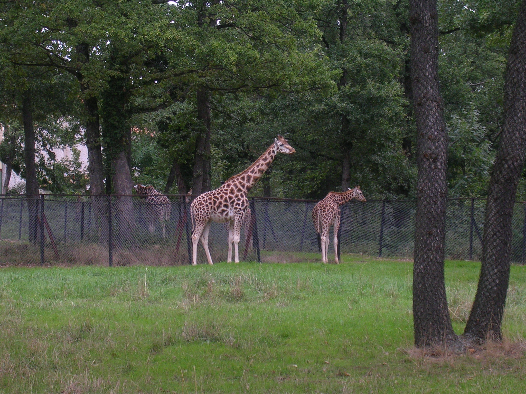 Photos de girafes au Safari de Peaugres. Pictures of Girafes from Safarie de Peaugres.